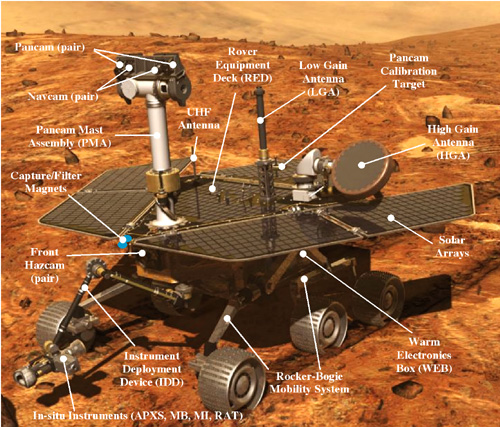 Il rover in dettaglio.